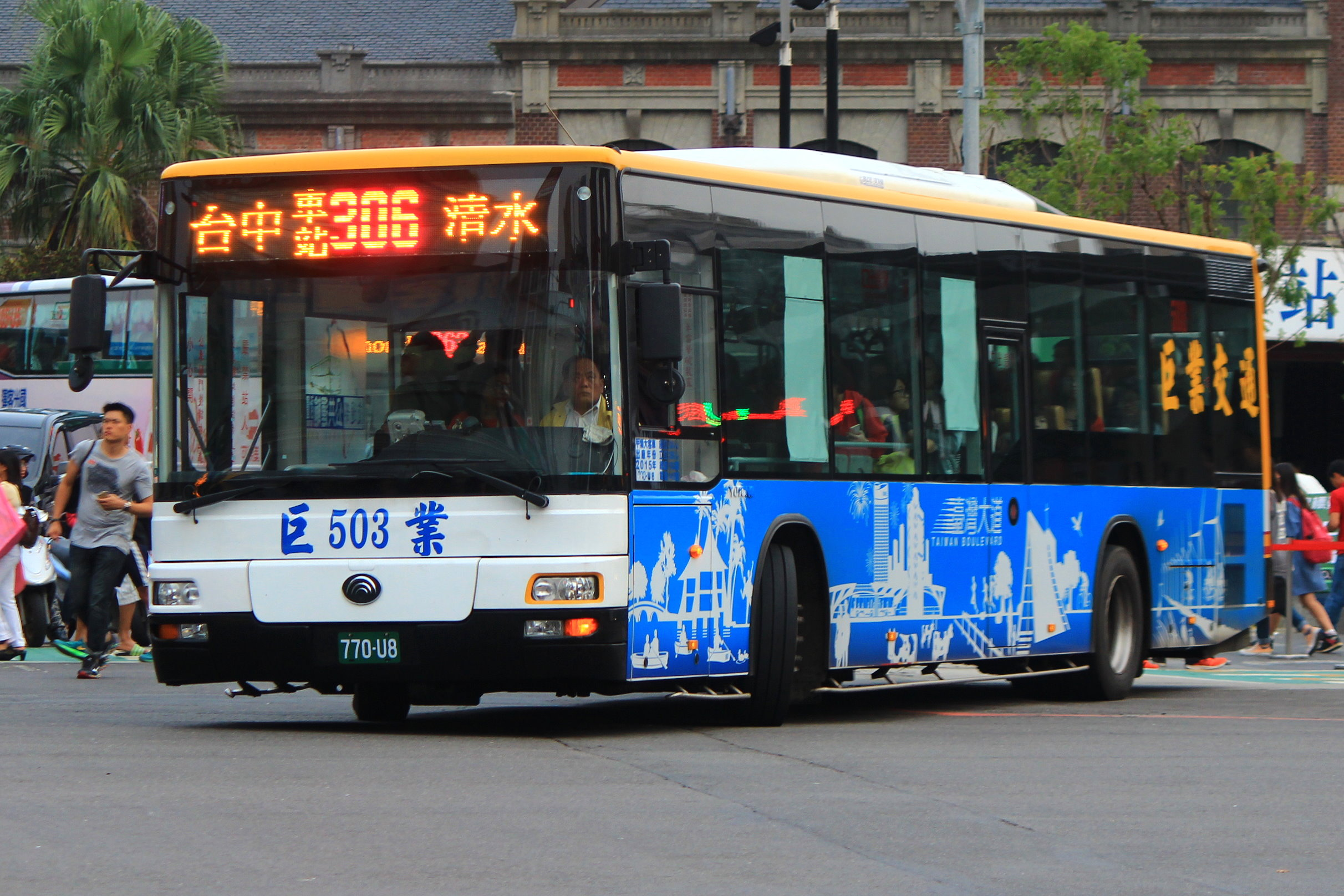 中文（台灣）: 巨業交通大客車770-U8